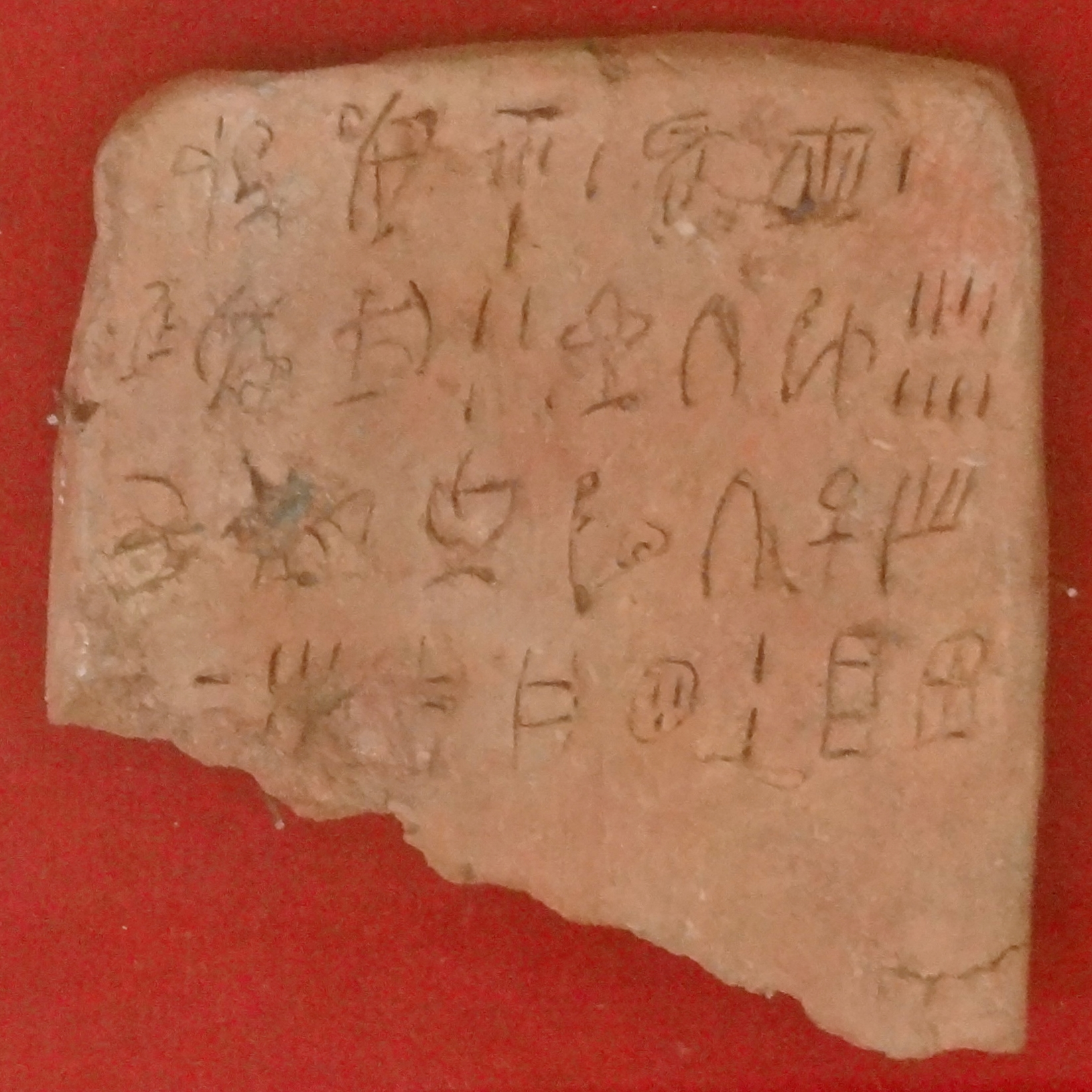 Tontafel mit Linearschrift A aus dem Palast von Zakros, Archäologisches Museum von Sitia, Kreta, Griechenland